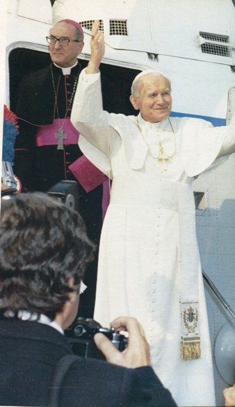 Papa Giovanni Paolo II assieme al cardinale e arcivescovo italiano Vincenzo Fagiolo